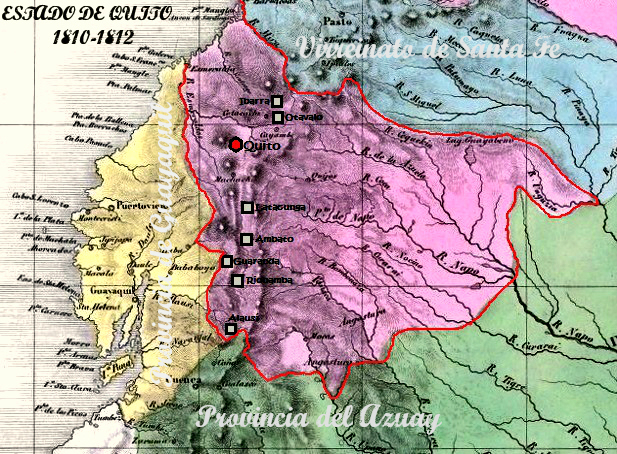 Mapa del Estado de Quito, entre 1810 y 1812. Se resaltan las ocho ciudades que enviaron representantes al Congreso Supremo instalado en la ciudad de Quito el 11 de octubre de 1811 por orden del coronel Carlos de Montúfar, mismas que pasaron a convertirse en provincias del nuevo Estado de Quito, cuya constitución se publicó el 15 de febrero de 1812; a saber: Alausí, Ambato, Guaranda, Ibarra, Latacunga, Otavalo, Quito y Riobamba.